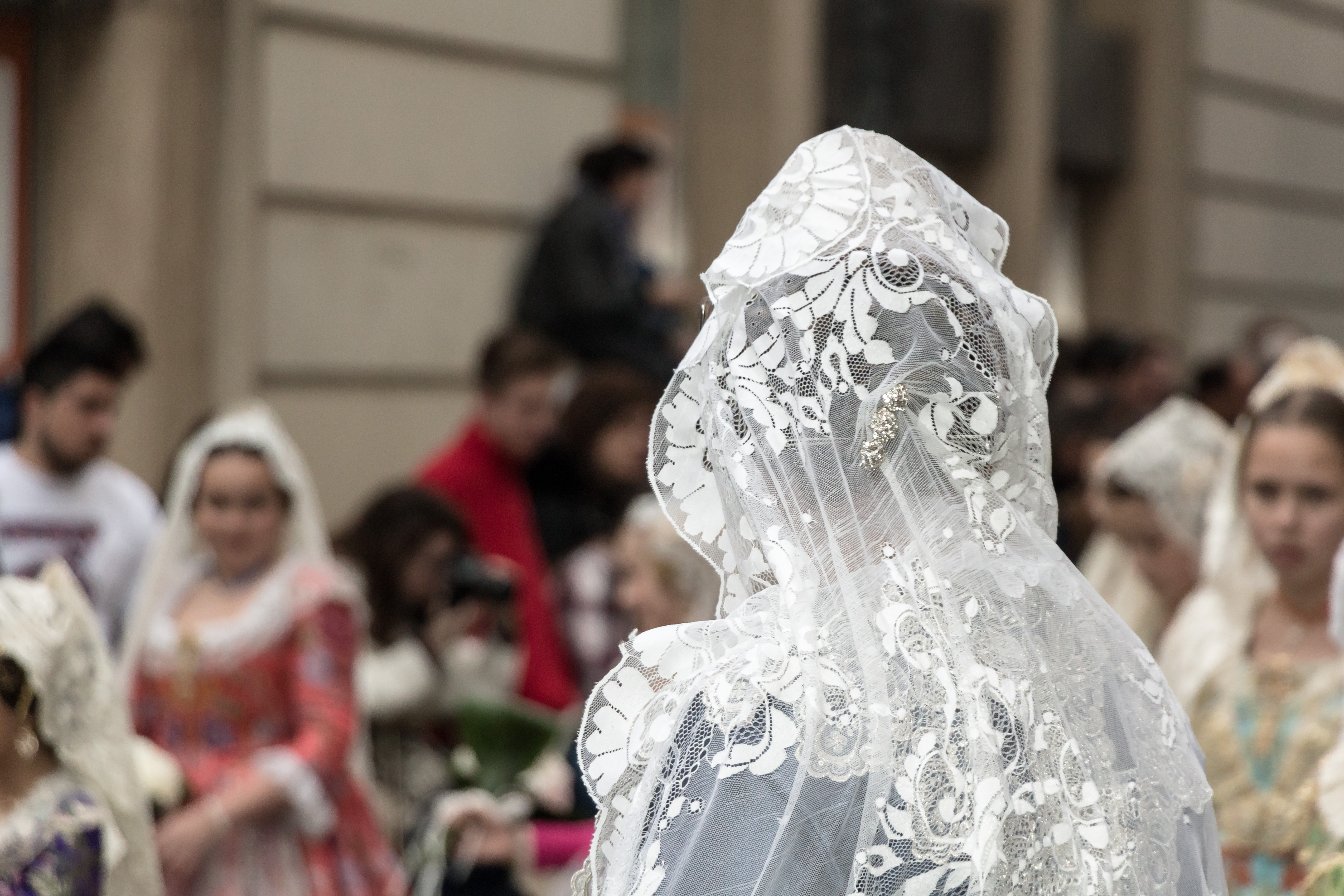 La Ofrenda de flores a la Virgen de los Desamparados es posiblemente el acto de origen religioso más importante de las fiestas falleras. Detalle de peinado con mantilla blanca. This is a photography of a Folklore festival in Spain (Wikidata id Q1143768).